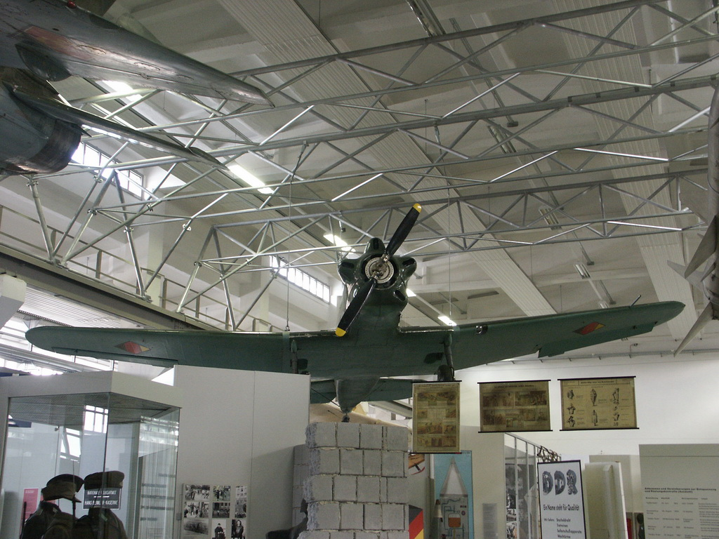 Bundeswehrmuseum Dresden mit Teilen von der NVA (Yak-18)